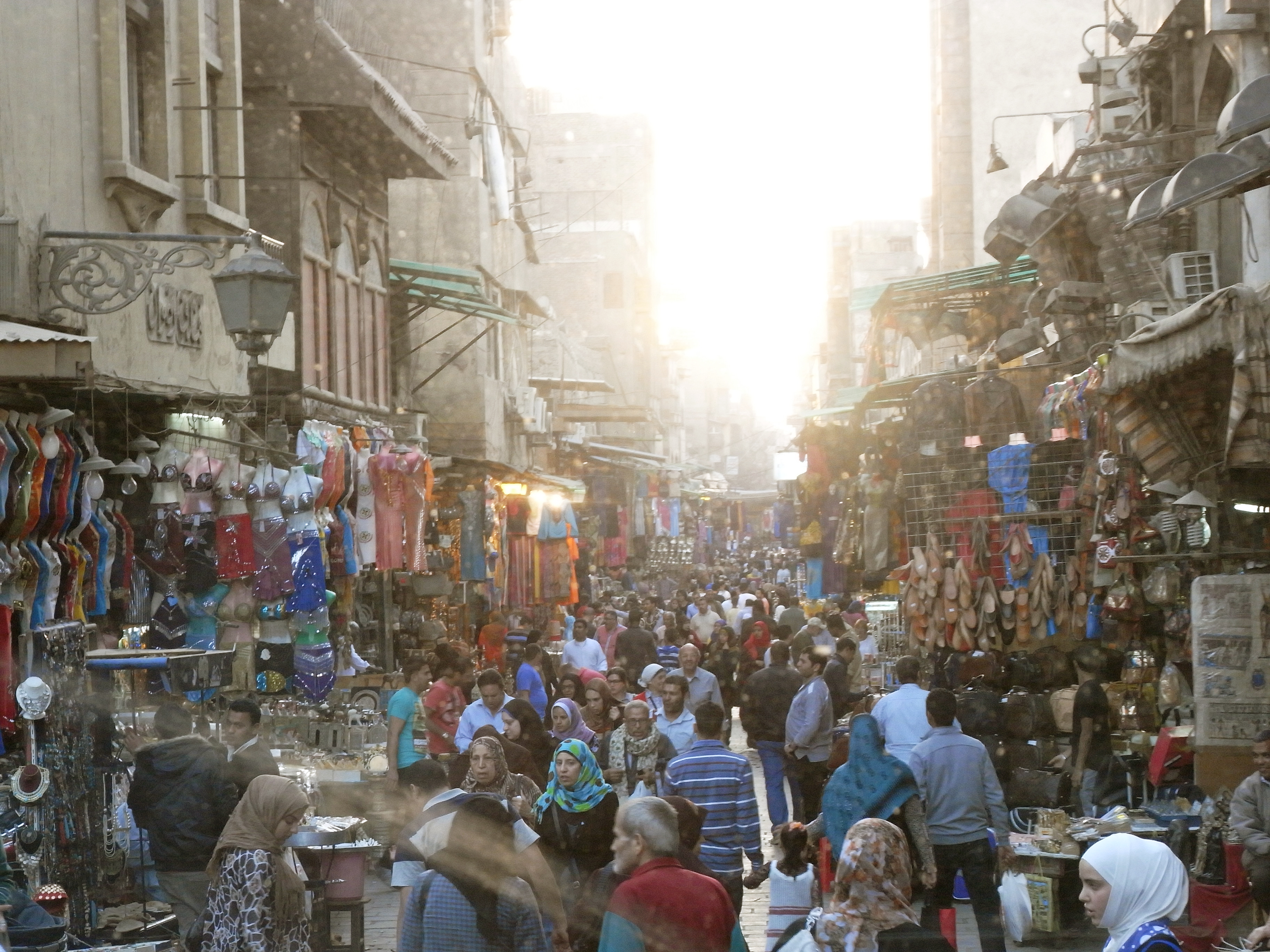 Khan el-Khalili, Cairo Egypt